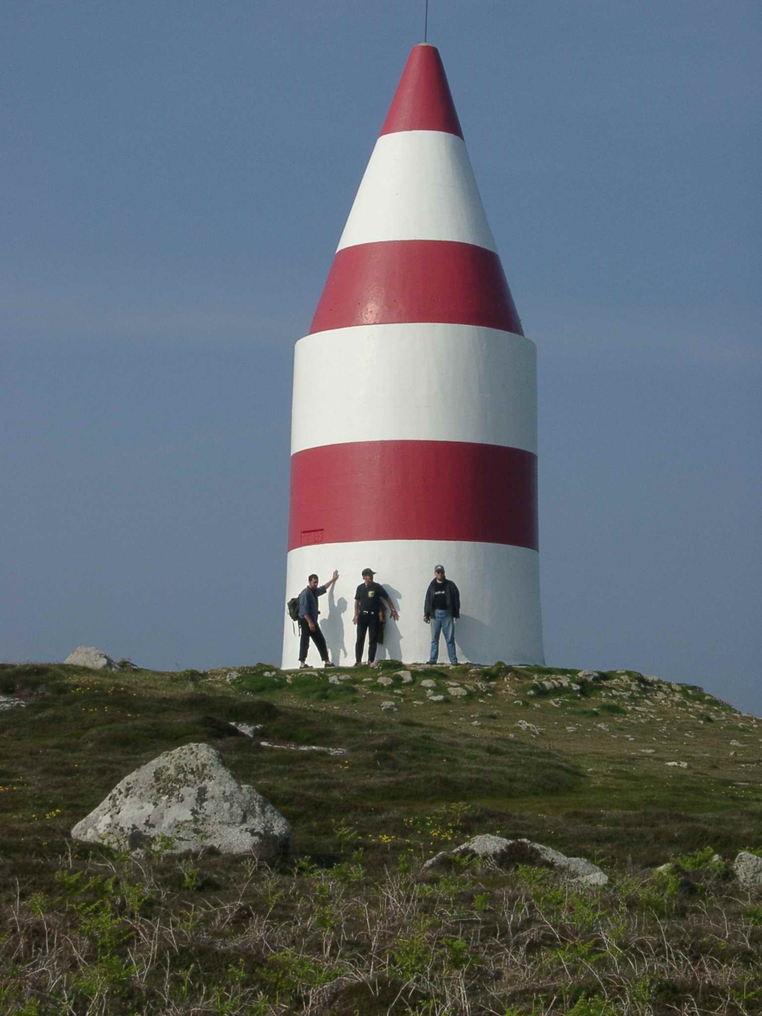 Description : Amer sur l'ile de Saint Martin dans l'archipel des Scilly (Royaume Uni) Place : Ile Saint Martin, Archipel des Scilly, Cornouaille, Royaume Uni Auteur : Pline Photo personnelle